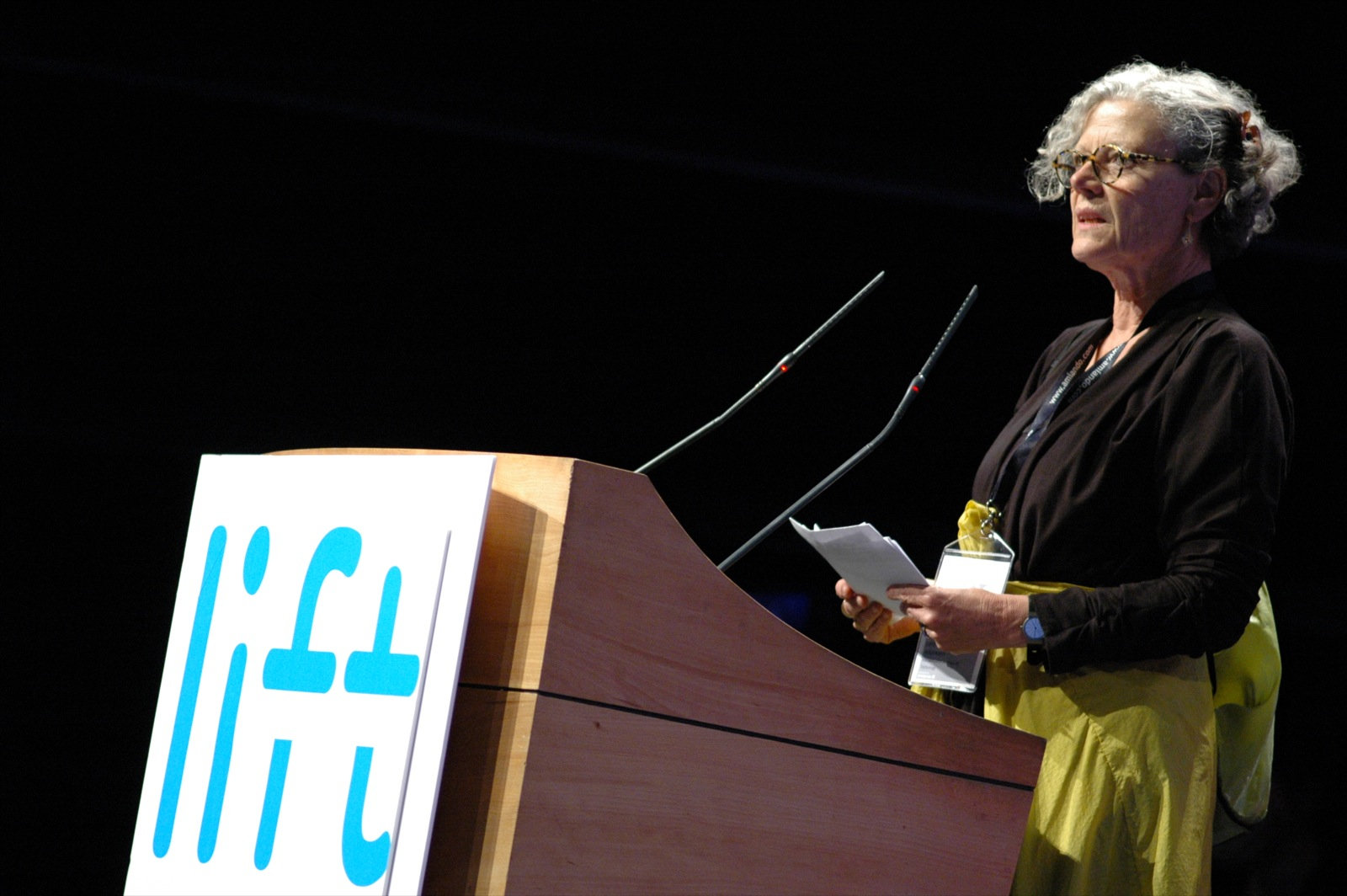 by